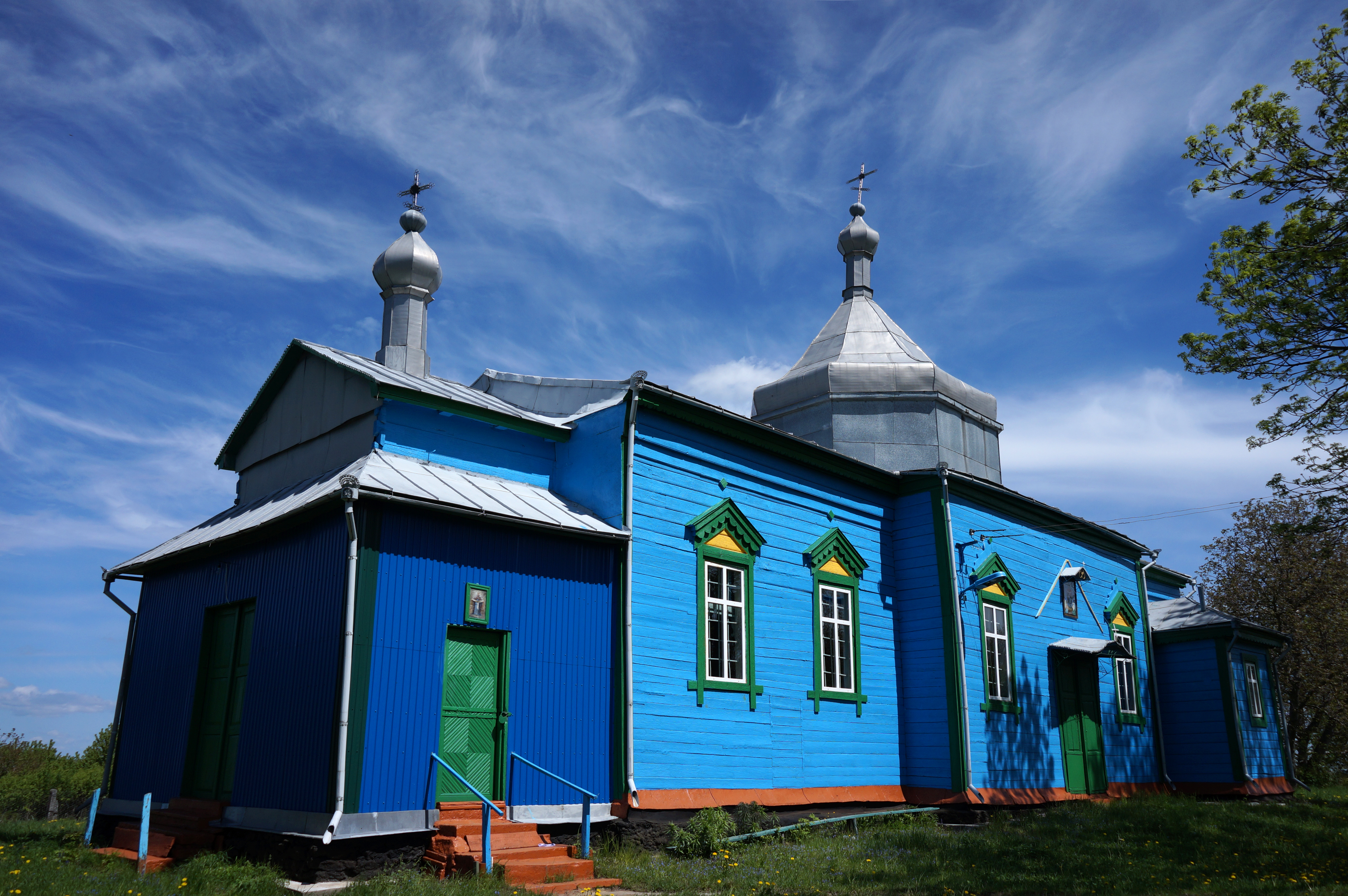 Покровська церква (дер.), село Редвинці